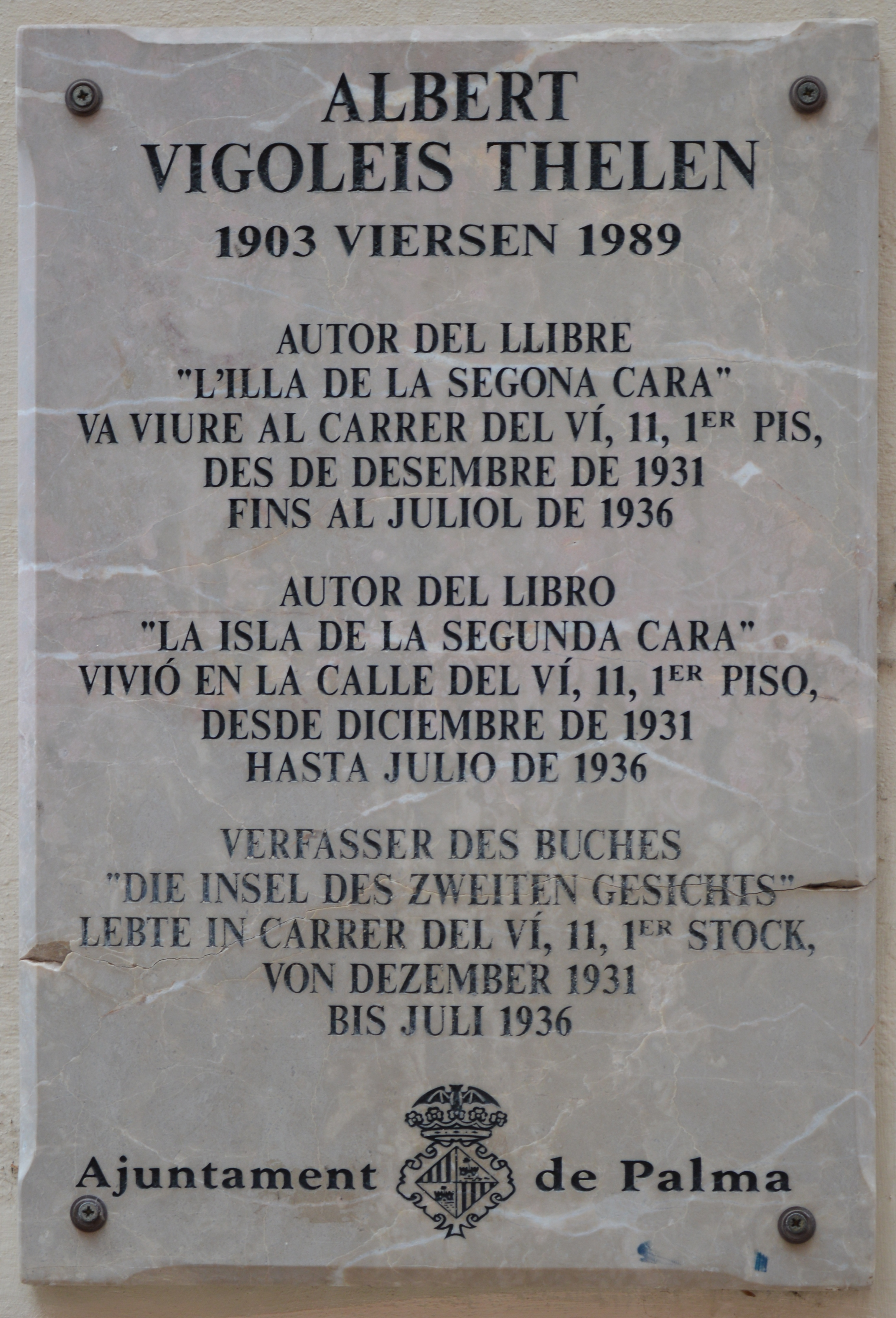 Albert Vigoleis Thelen, Gedenktafel an einer Hauswand in Palma de Mallorca